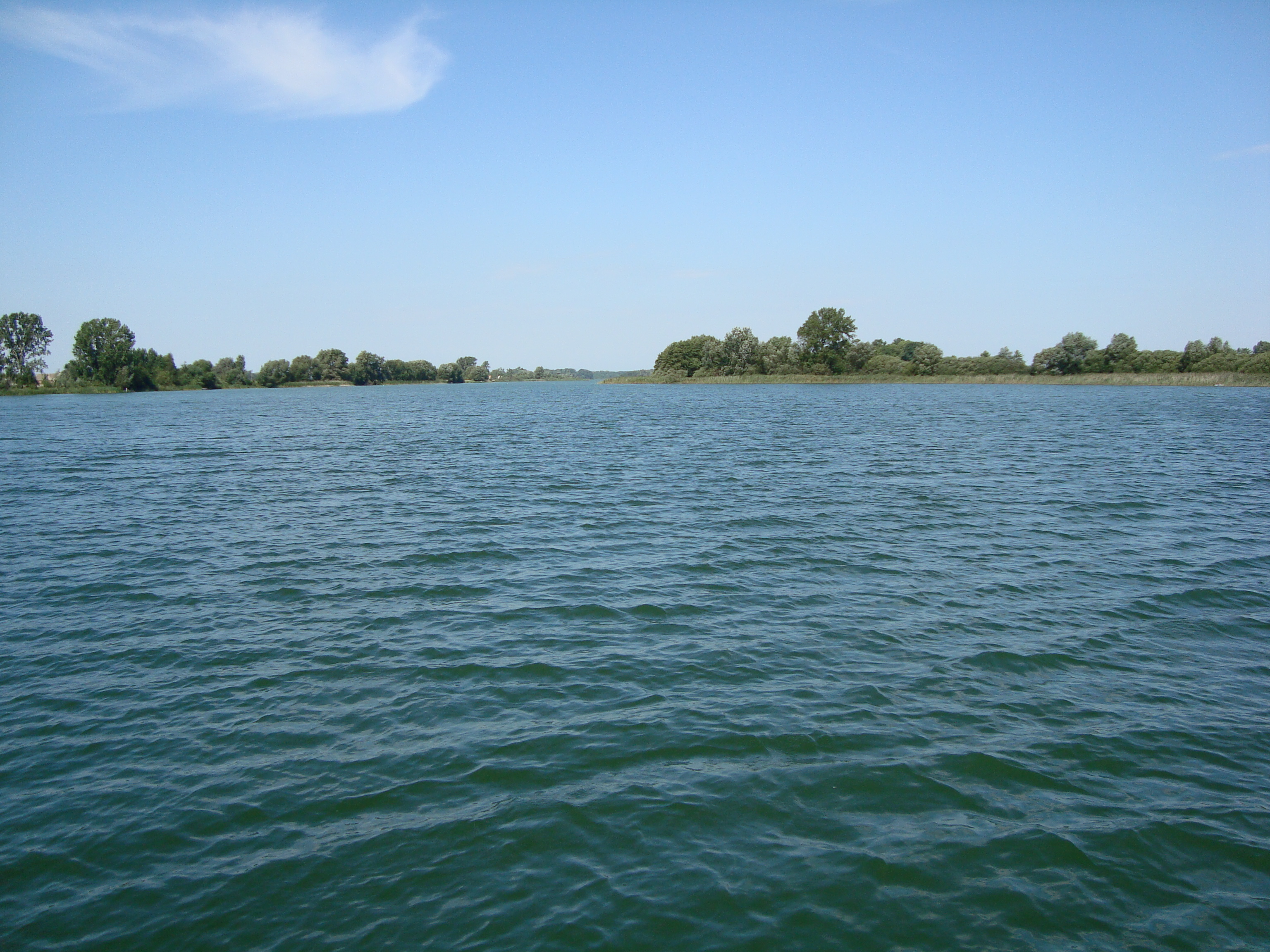 Gopło - widok na jezioro z promu Ostrówek - Złotowo. Po lewej stronie widoczny Półwysep Potrzymiech